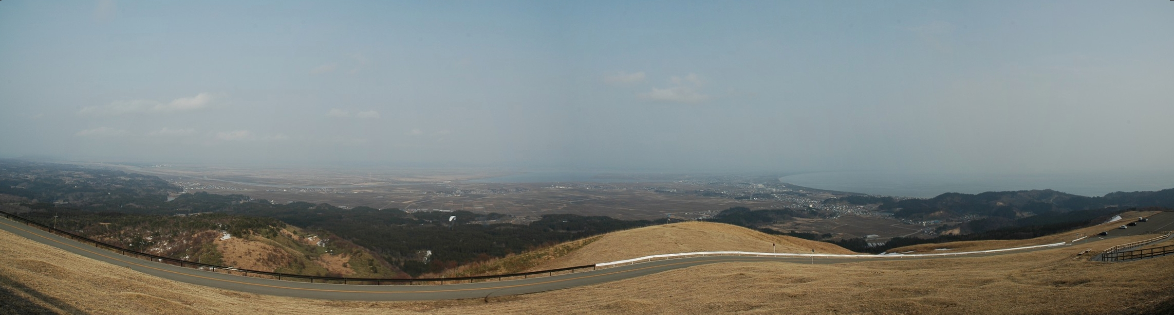 寒風山からのパノラマ写真